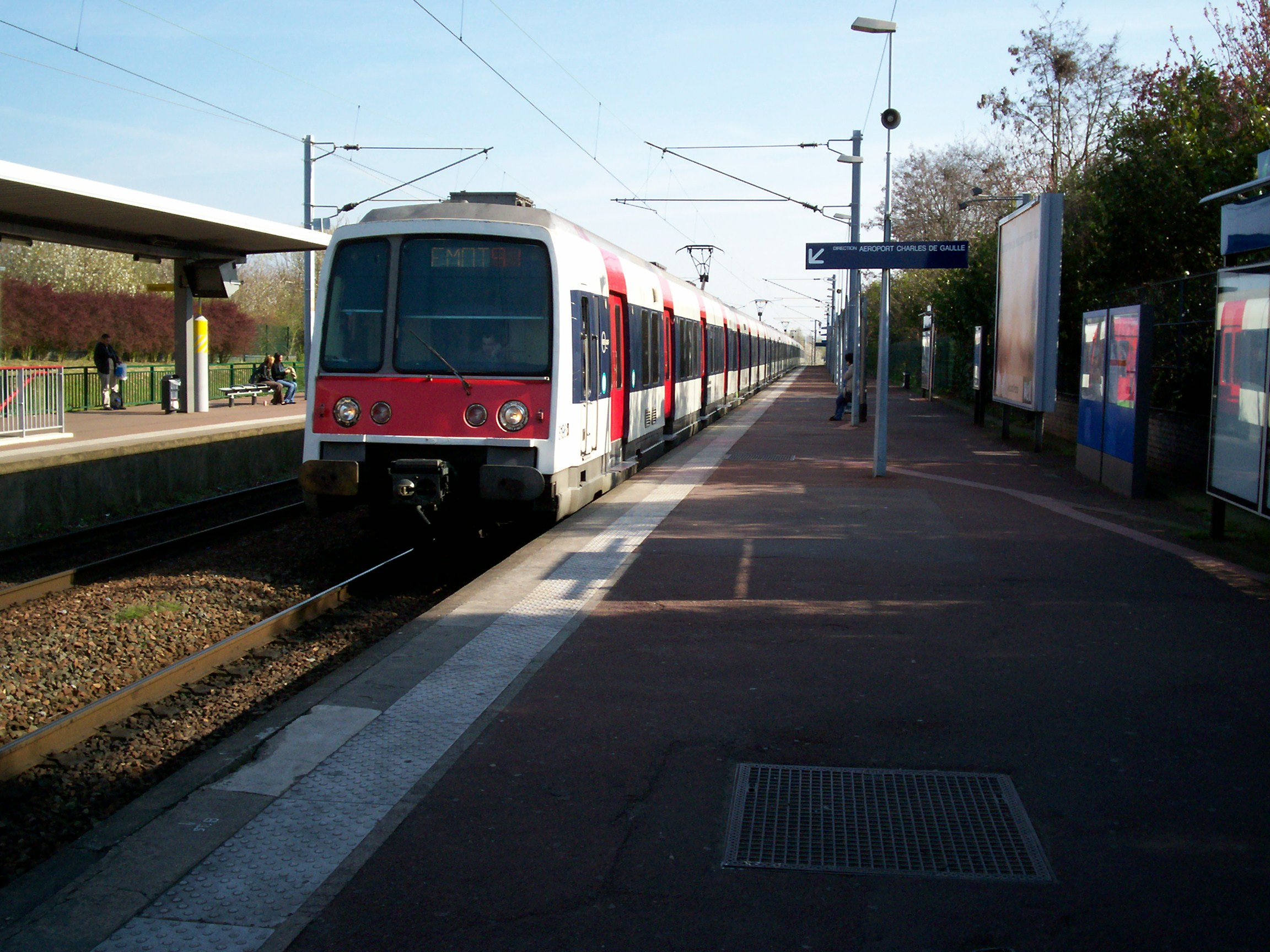 MI 79 - Gare de Villepinte